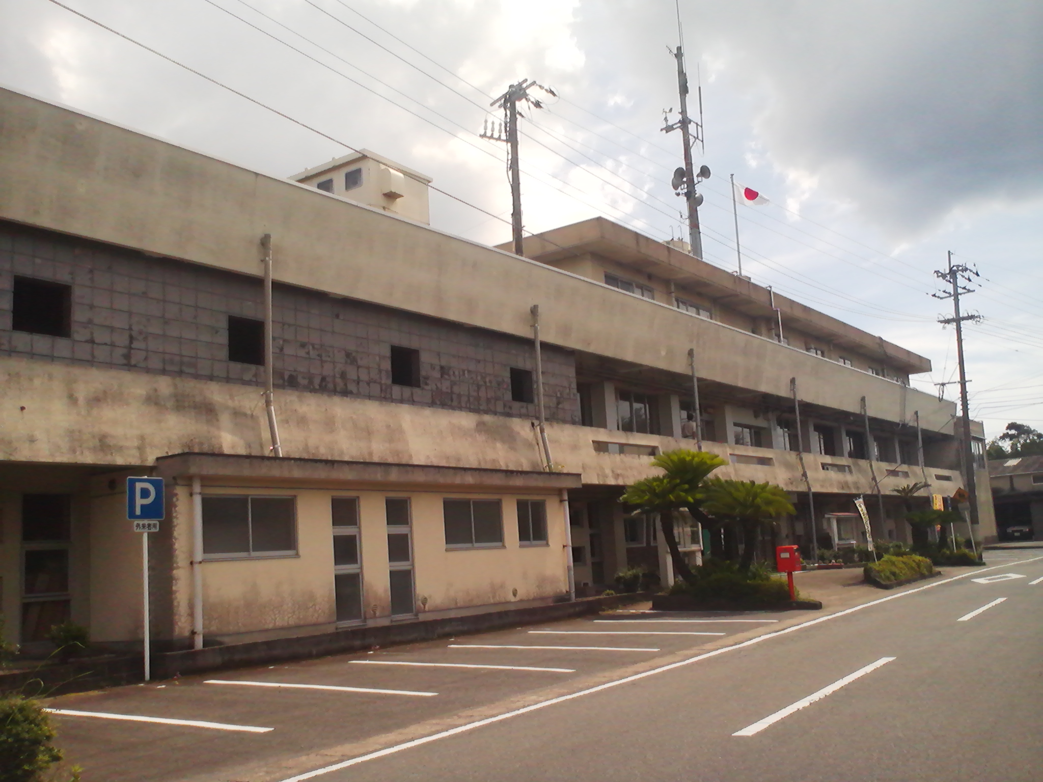 日置市役所日吉支所の外観。